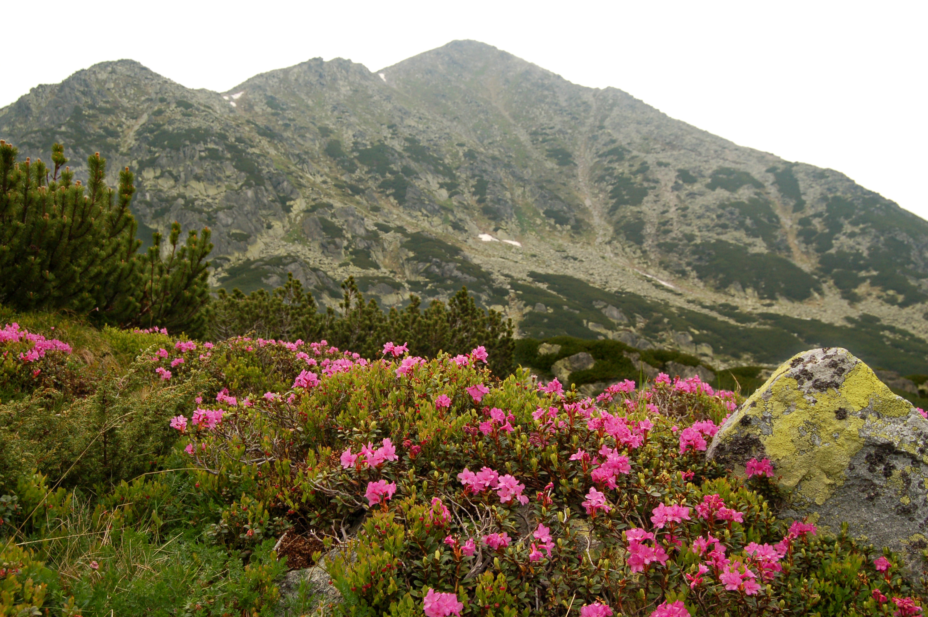 Retyezát-csúcs virágzó rododendronokkal (2007.06.16)